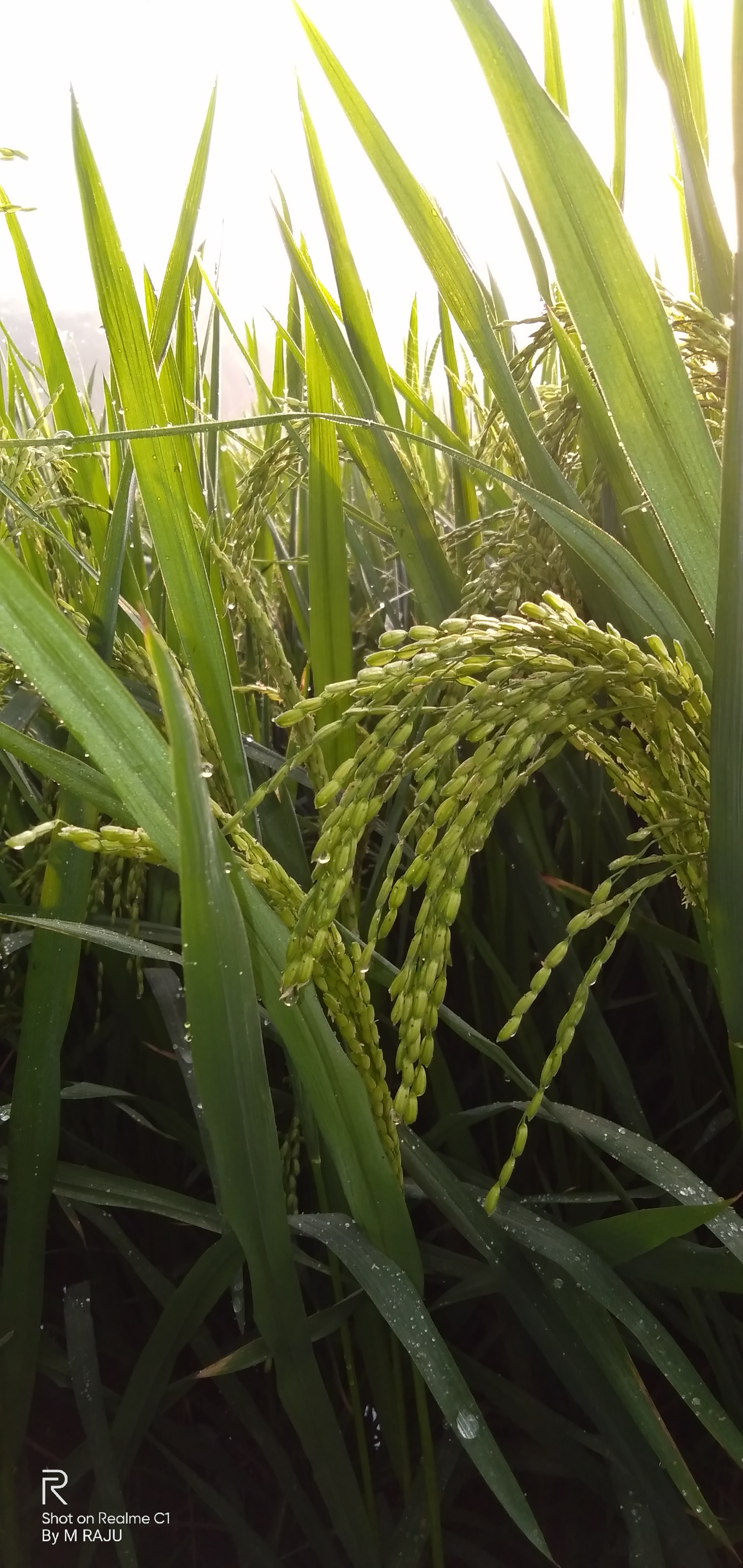 వరి పంట గింజలు